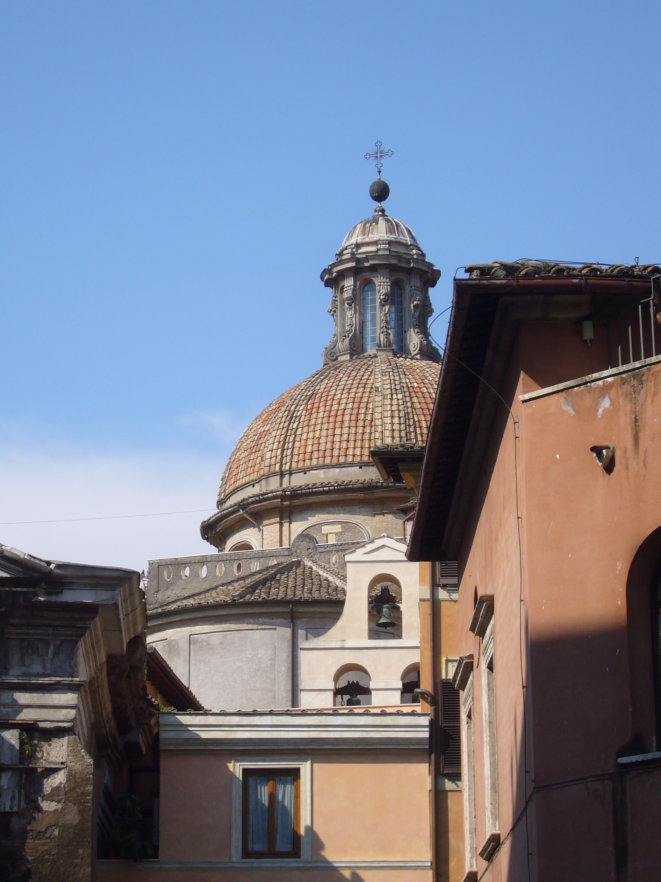 Roma, Portico di Ottavia: Cupola e campanile a vela di S. Angelo in Pescheria.